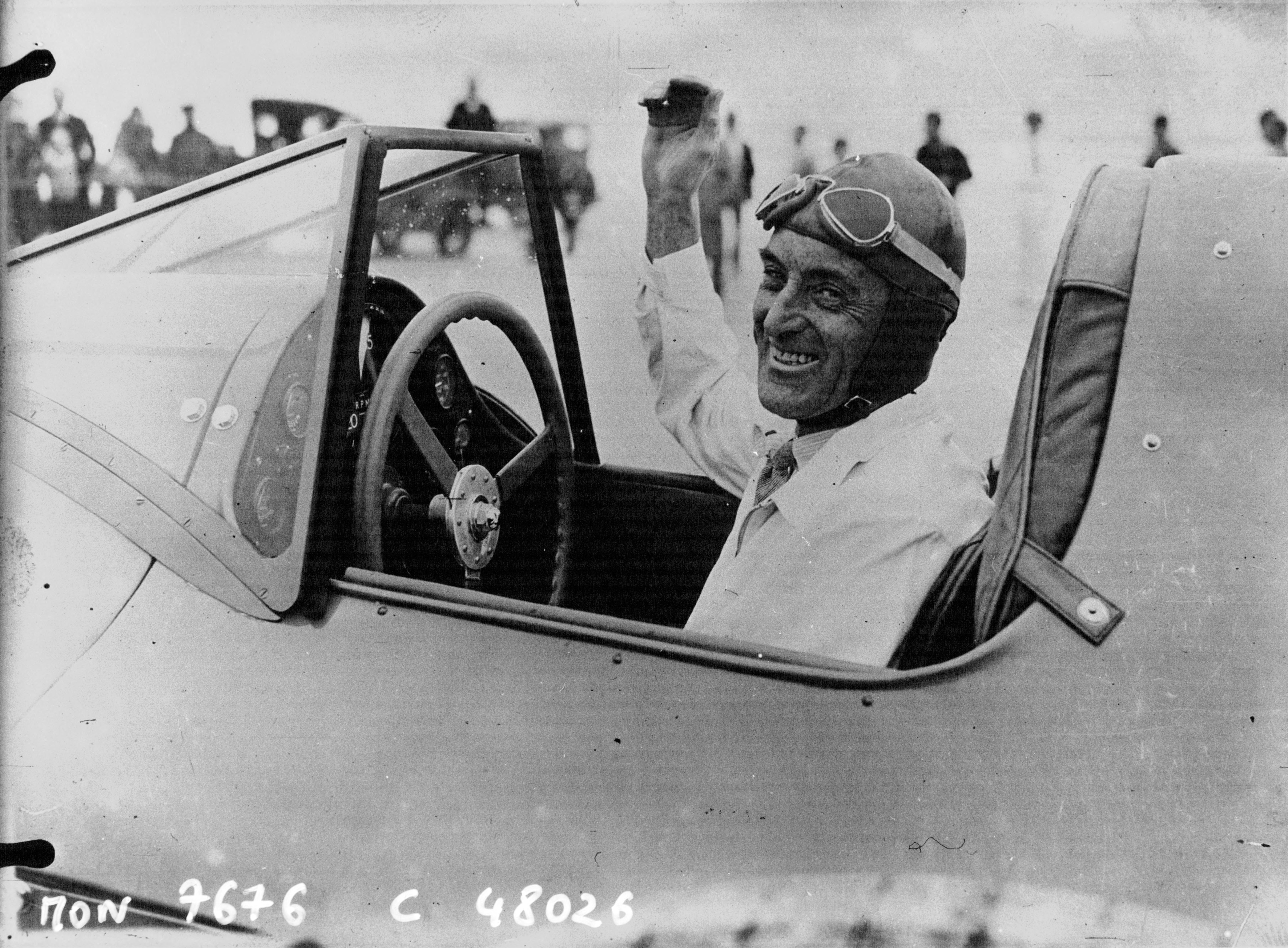 Sir Malcolm Campbell dans sa "Blue Bird" à Daytona Beach.